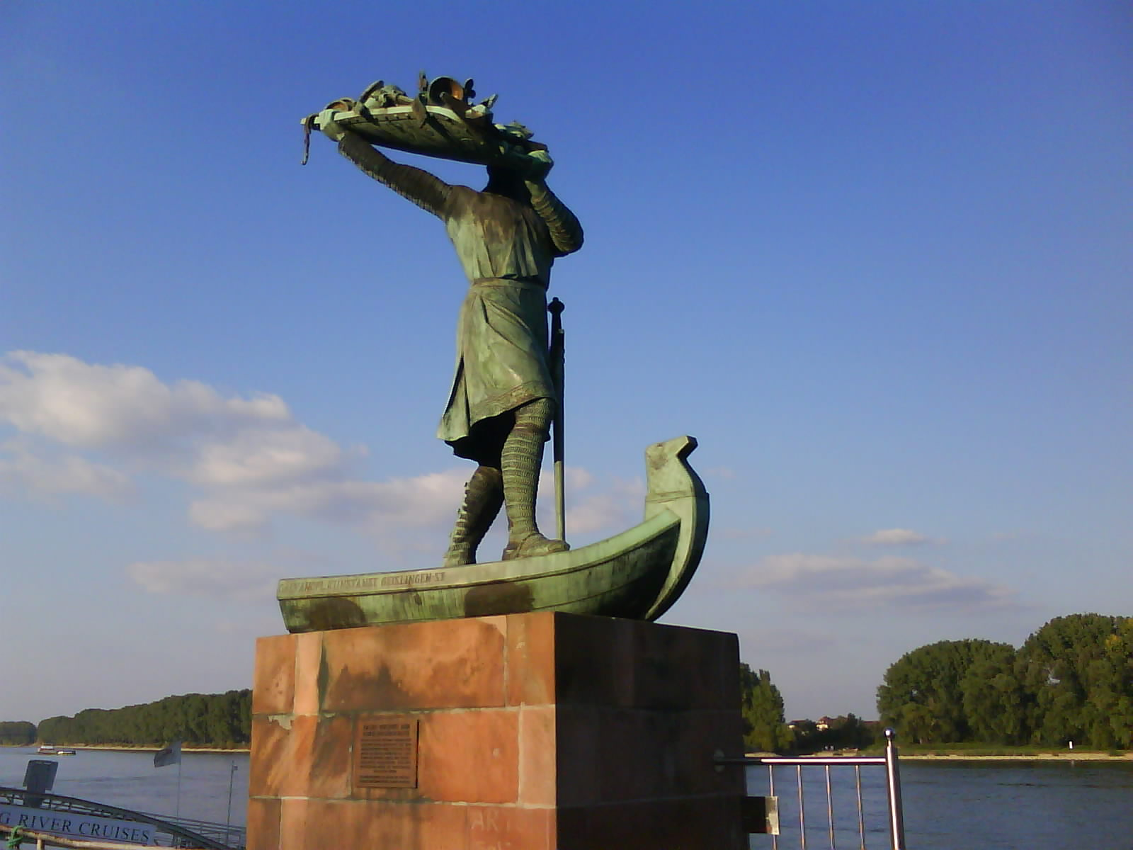 Памятник Хагену - герою Саги о Нибелунгах на берегу Рейна в городе Вормс, Германия